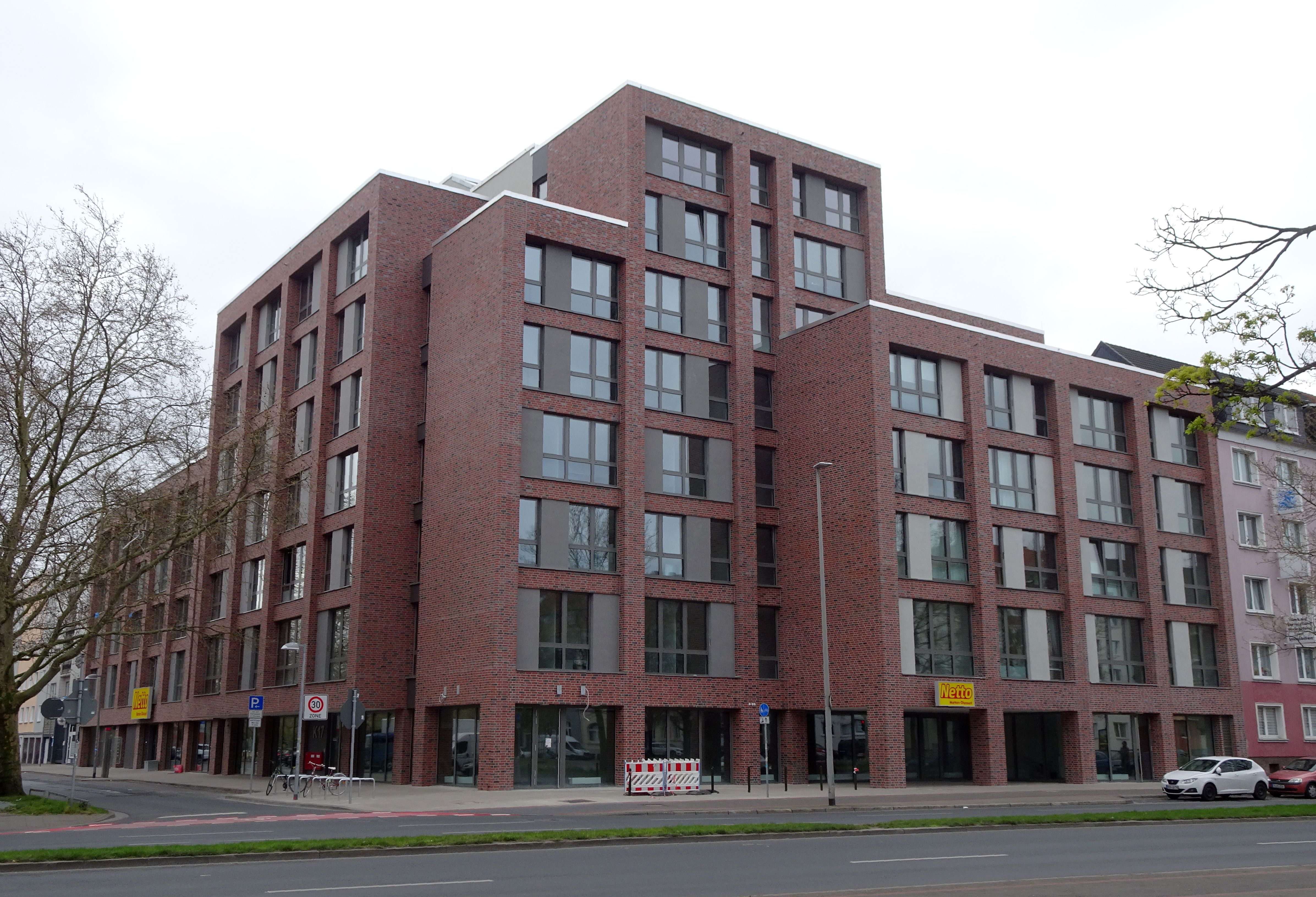 Gebäude Am Klagesmarkt 17 in Hannover